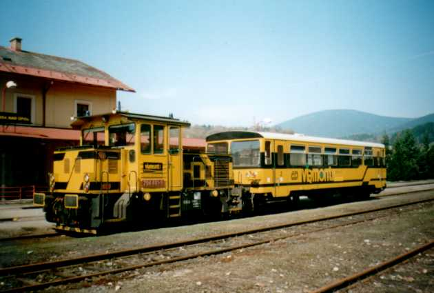 Lokomotiva řady 704 společnosti Viamont v žst. Svoboda nad Úpou